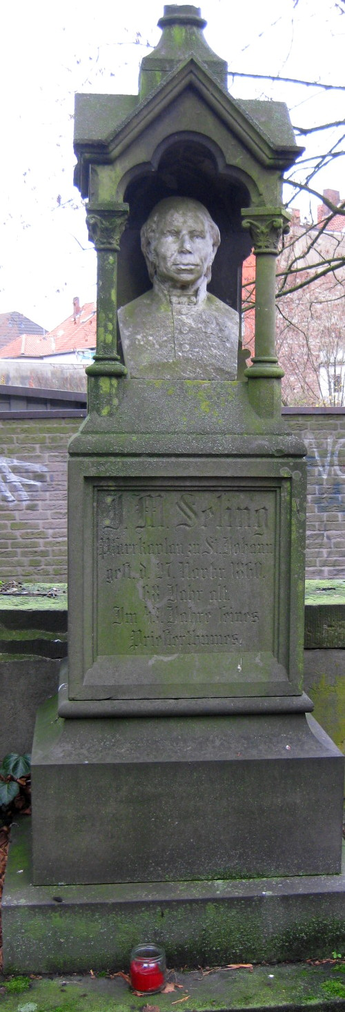 Grabmal von Mathias Seling (1792-1860), Pfarrkaplan von St. Johann (Osnabrück), auf dem Johannisfriedhof in Osnabrück